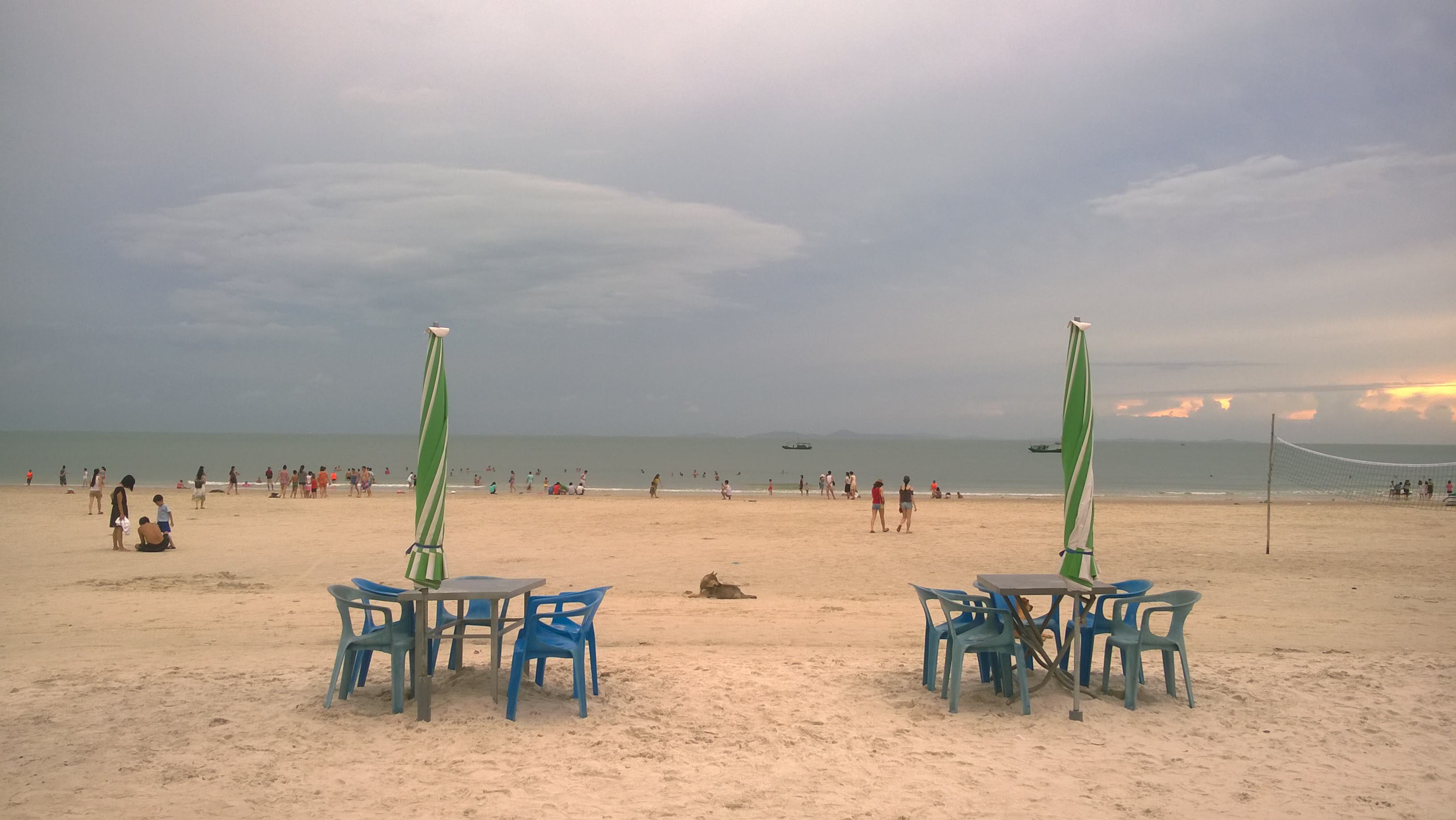 Dịch vụ tắm biển ở Bãi tắm Thủy Triều ở đảo Cồn Nổi, Kim Sơn, Ninh Bình